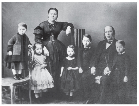 Семья Осипа Шехтеля. Федор Шехтель - крайний справа